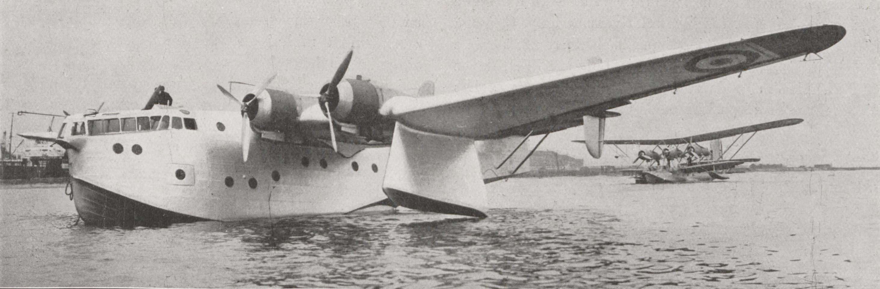 Aspect à flot de l'hydravion de croisière BREGUET 730, à 4 moteurs GNOME-RHÔNE 14 No